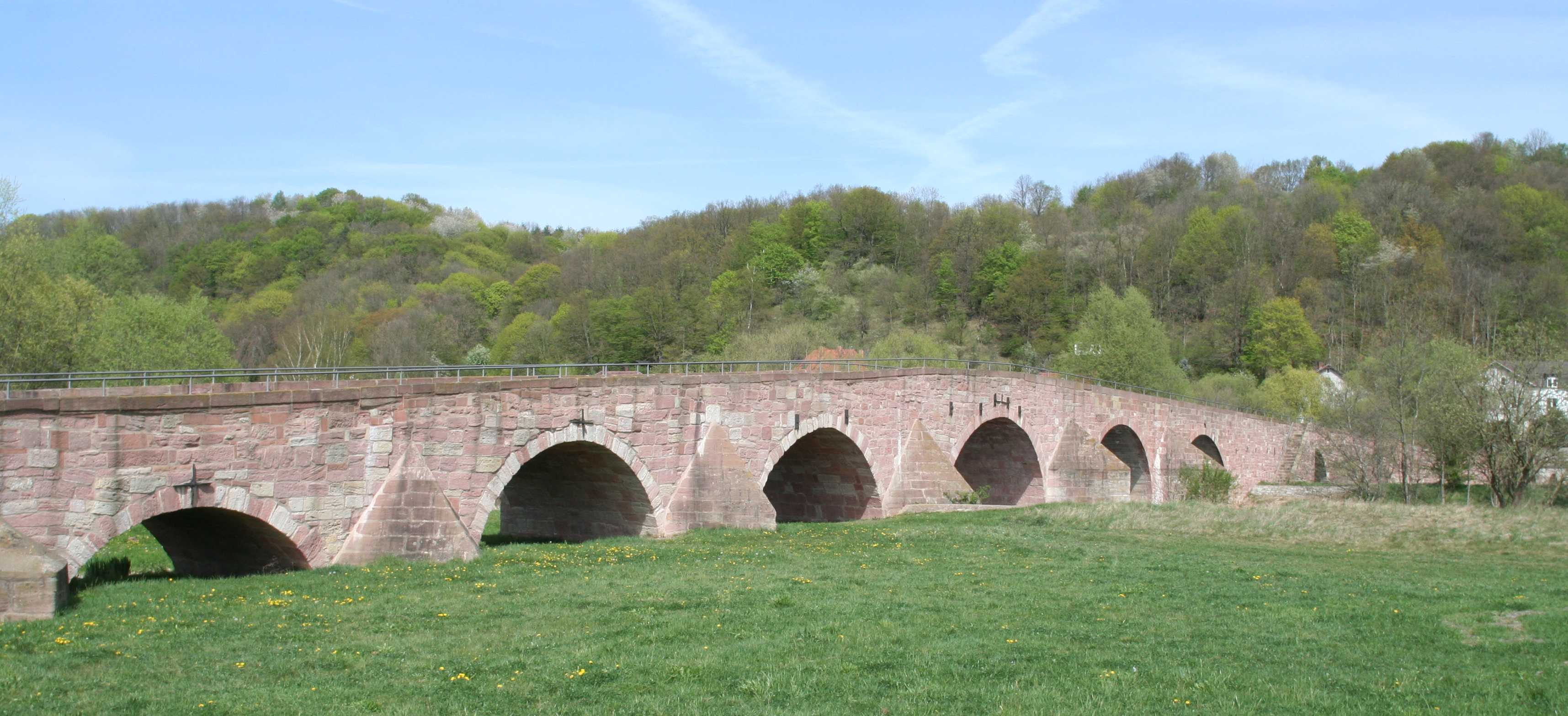 Werrabrücke in Vacha, Landkreis Wartburgkreis